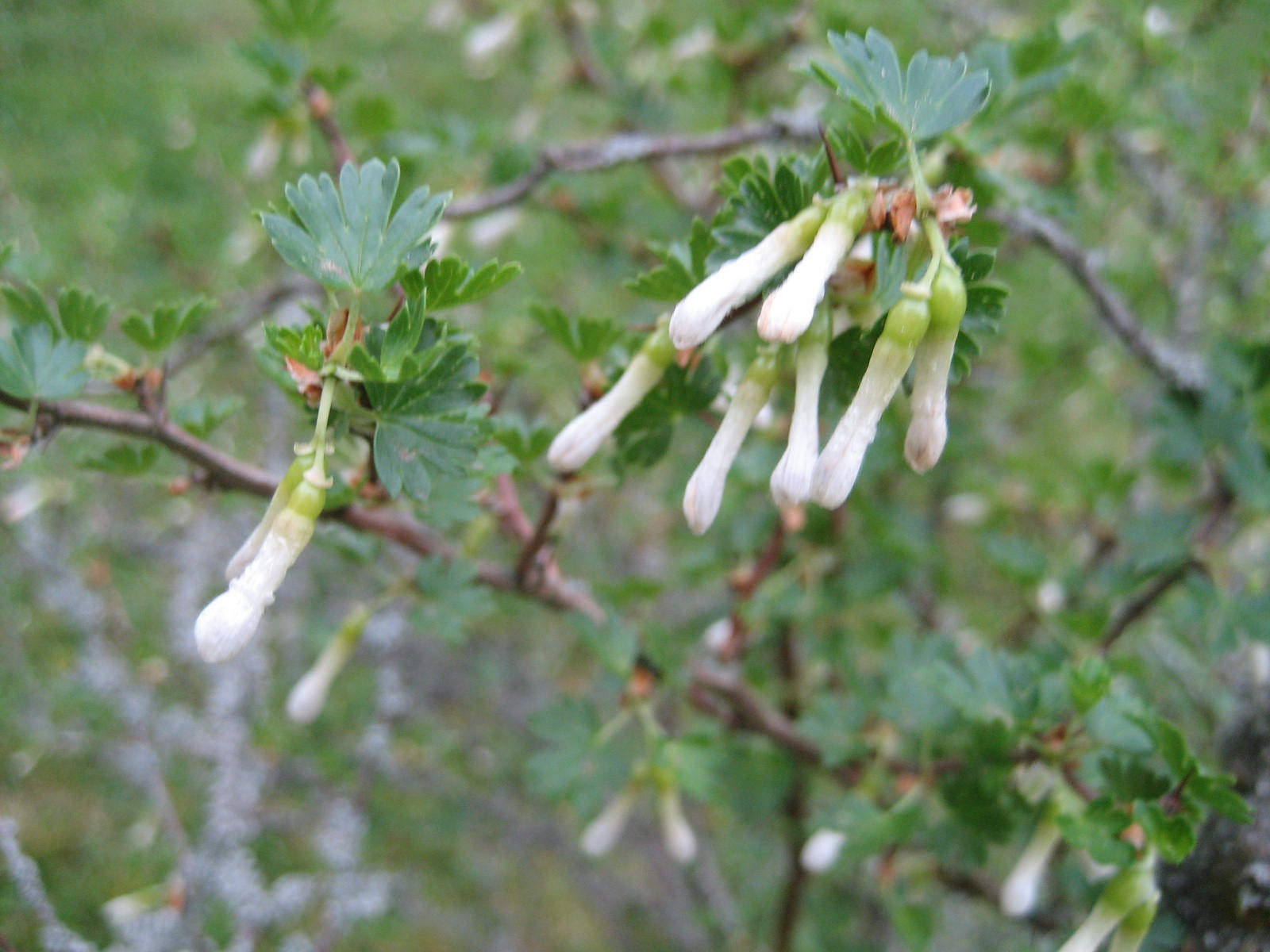 Ribes leptanthum - Blüte - Bot. Garten Berlin Dahlem